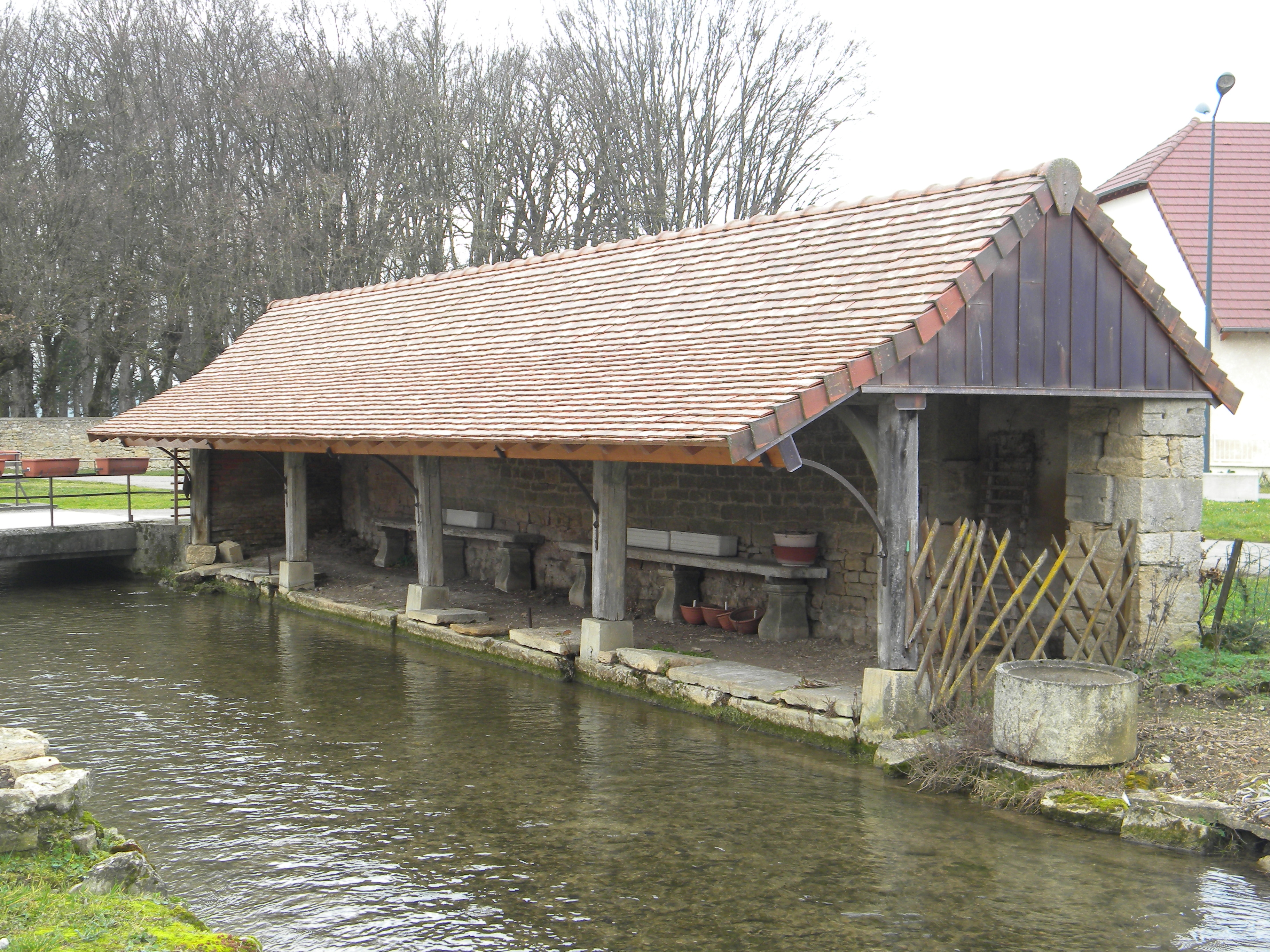 Lavejo en Villevieux en la francia departemento Ĵuraso